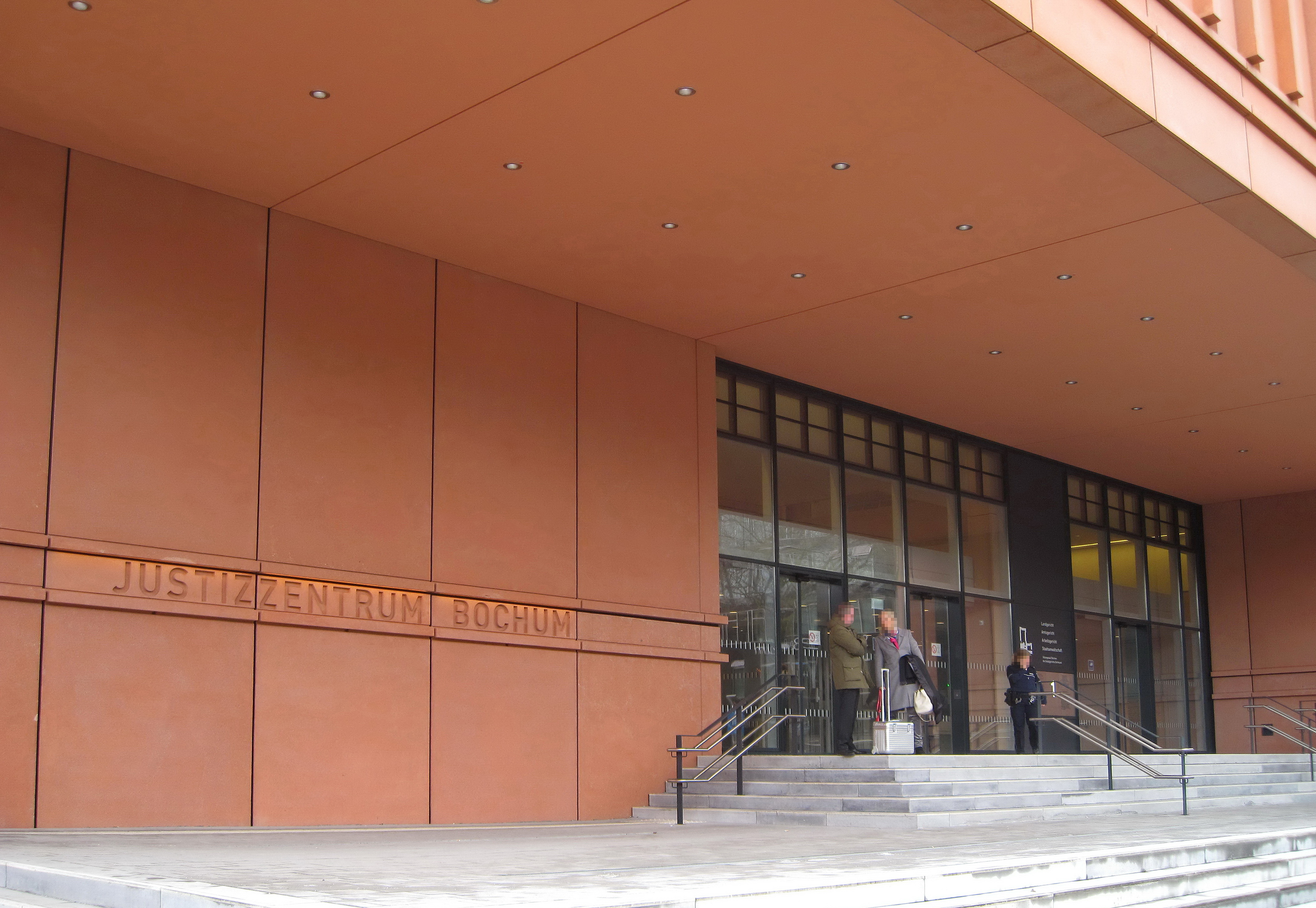 Eingangsbereich an der Nordwest-Ecke des Saaltraktes des Justizzentrums Bochum, Josef-Neuberger-Straße 1 (früher Am Ostring) in Bochum.